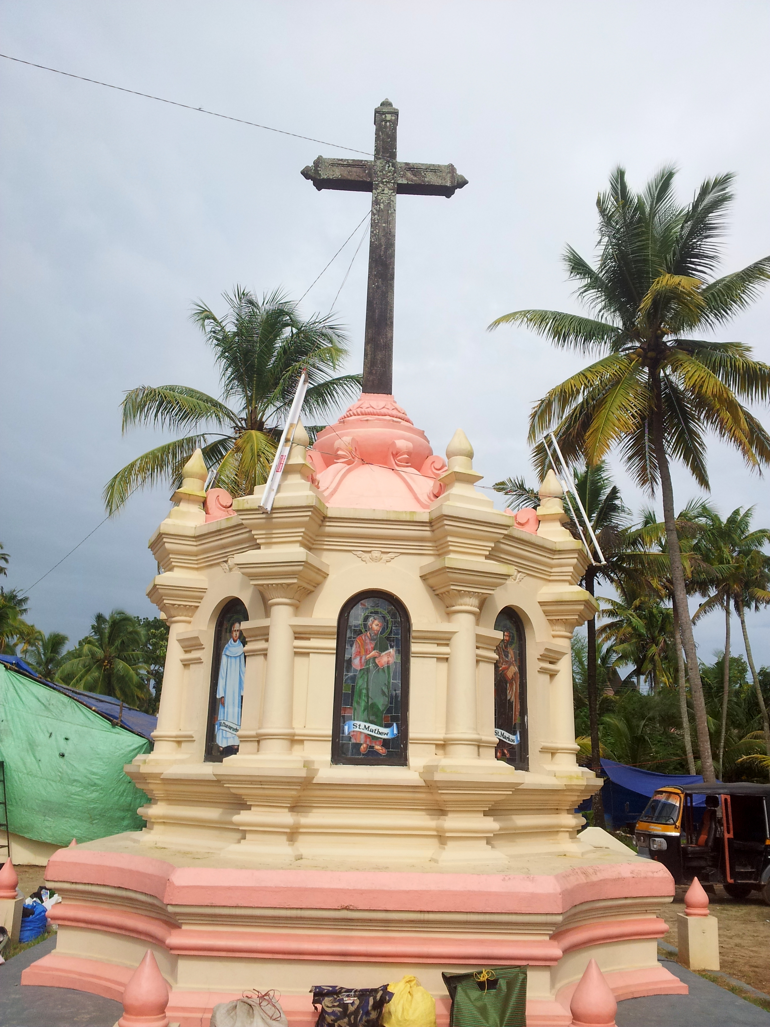 രണ്ട് കല്ലിൽ തീർത്ത കൽക്കുരിശ്, വെച്ചൂർ പള്ളി